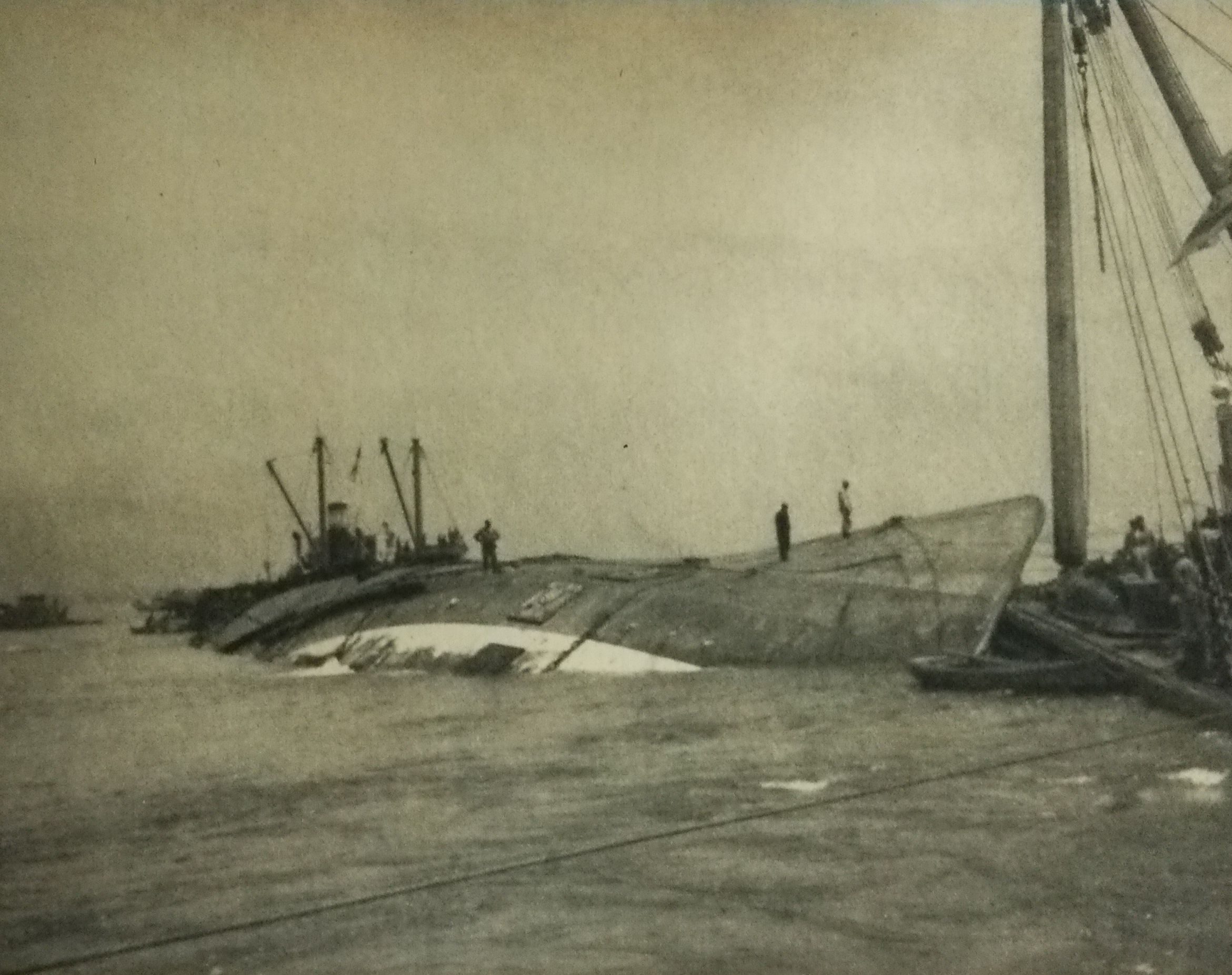 港へ曳航される洞爺丸